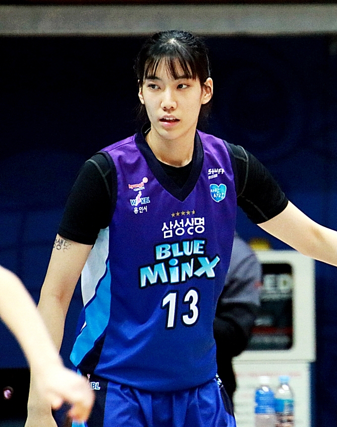 160110 여자농구 신한은행 vs 삼성생명 직찍 2